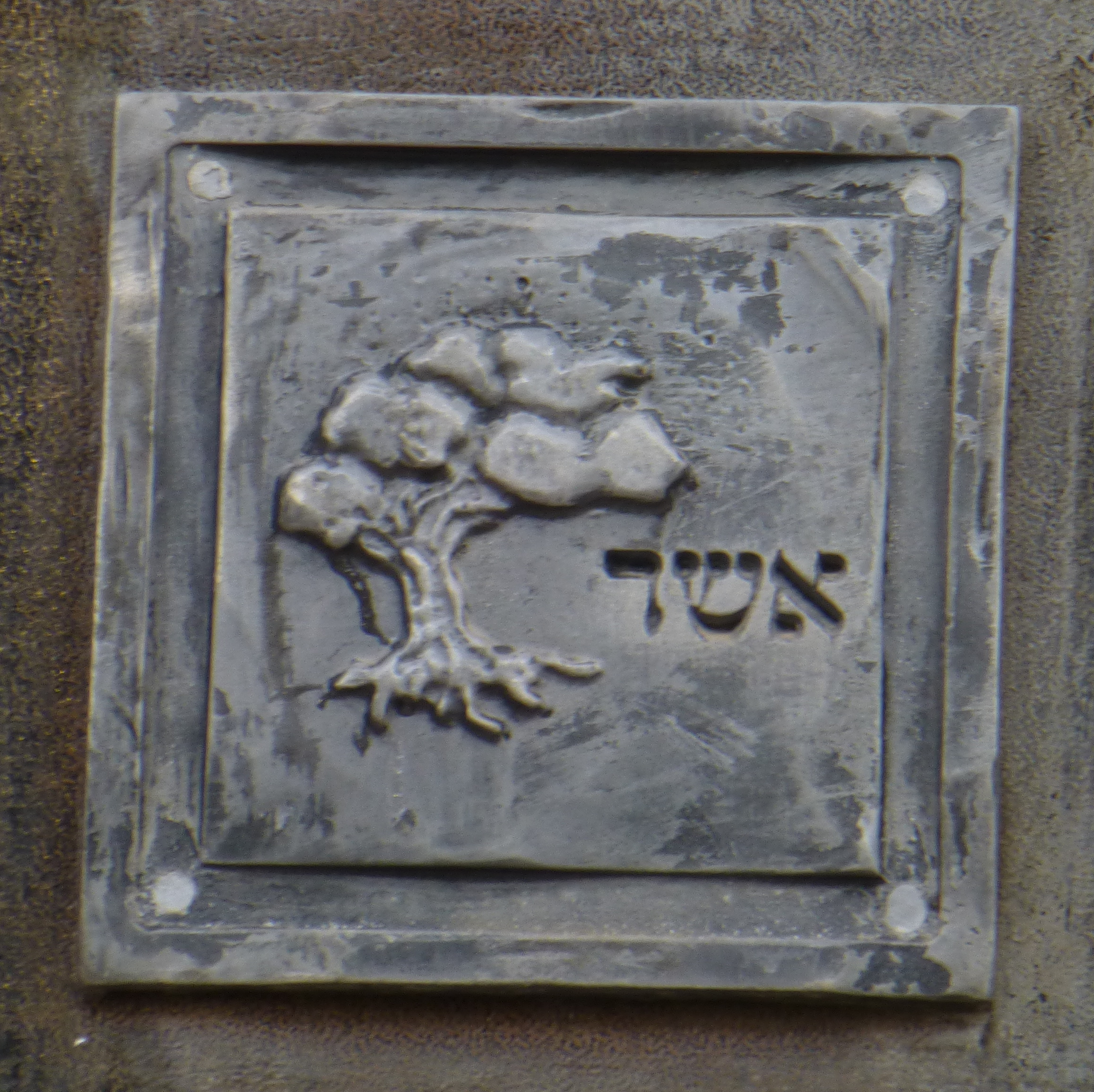 בית הכנסת הגדול "אוהל שרה" - בית הכנסת הראשון של רחובות, נבנה בשנת תרס"ד? ובהמשך שופץ והורחב והיה למוקד הקהילתי והחברתי של המושבה הצעירה.